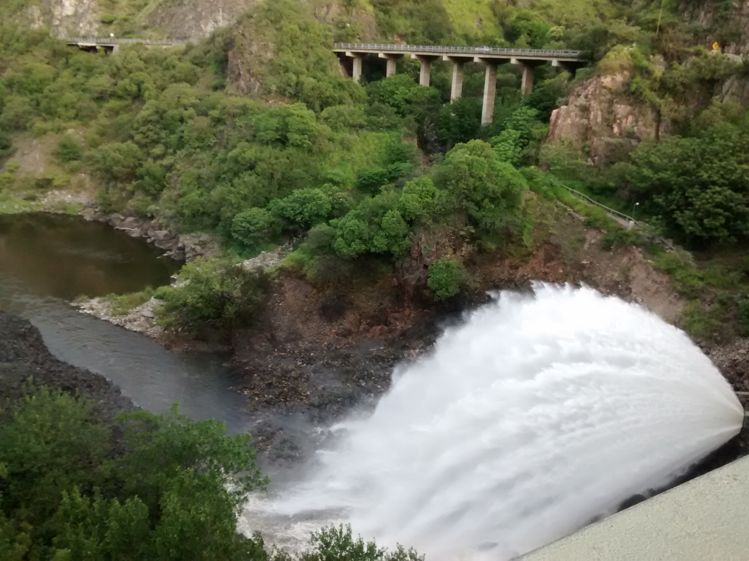 Fotografía de los aspersores del Dique San Roque funcionando a plena capacidad.